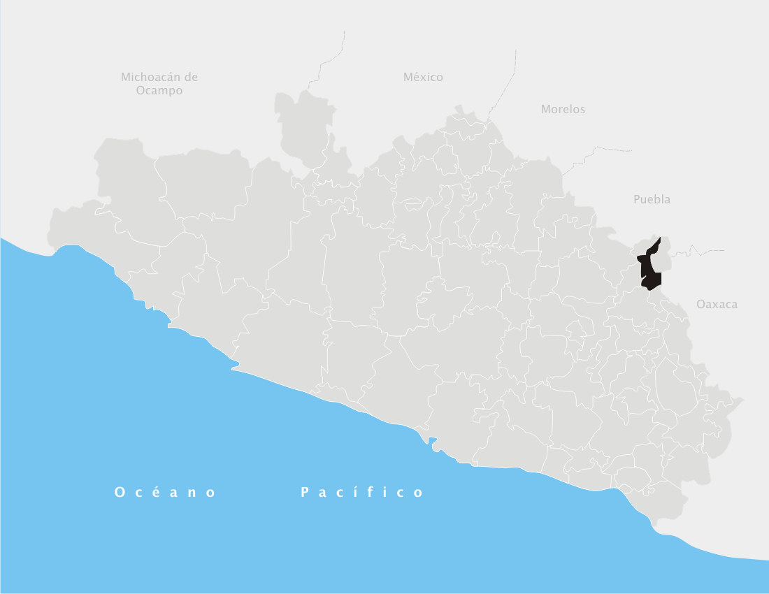 Huamuxtitlán en el estado de Guerrero (México)